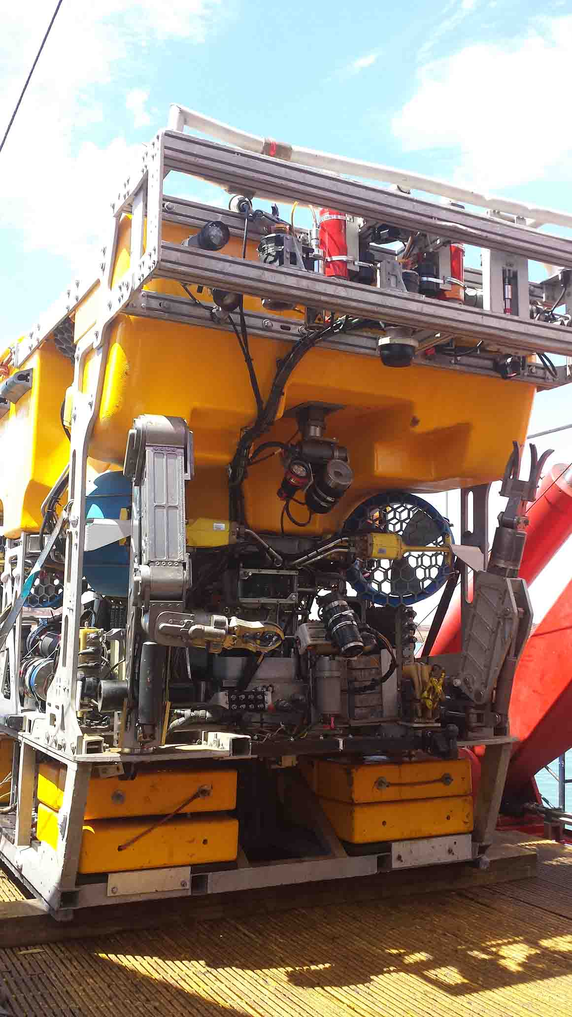 ROV work class usato per lavori ad alta profondità